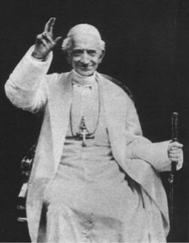 Pope Leo XIII in 1898.